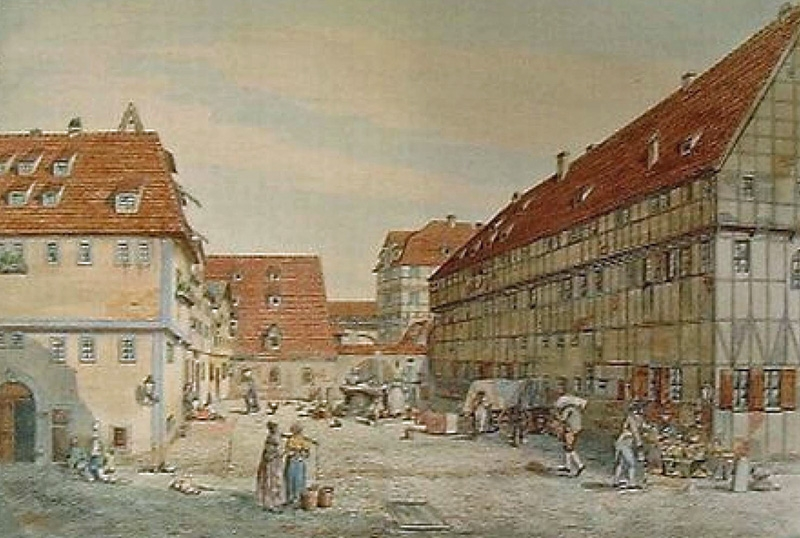 Der Eselsplatz (heute Ritterstraße) in Leipzig mit dem Kleinen Kolleg (rechts) und der mit Pferdekraft betriebenen Rossmühle um 1800